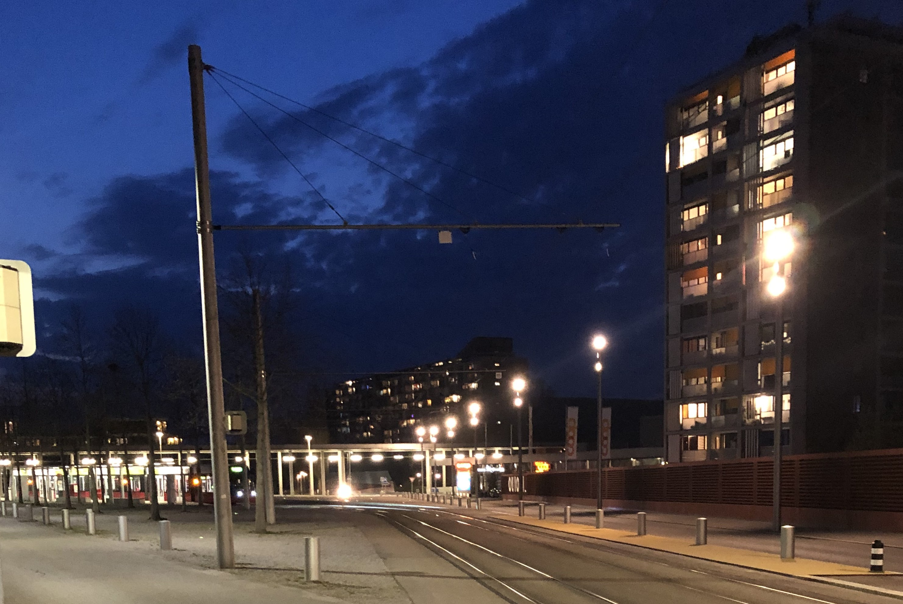 Blick auf Gäbelbach von der Murtenstrasse bei Nacht